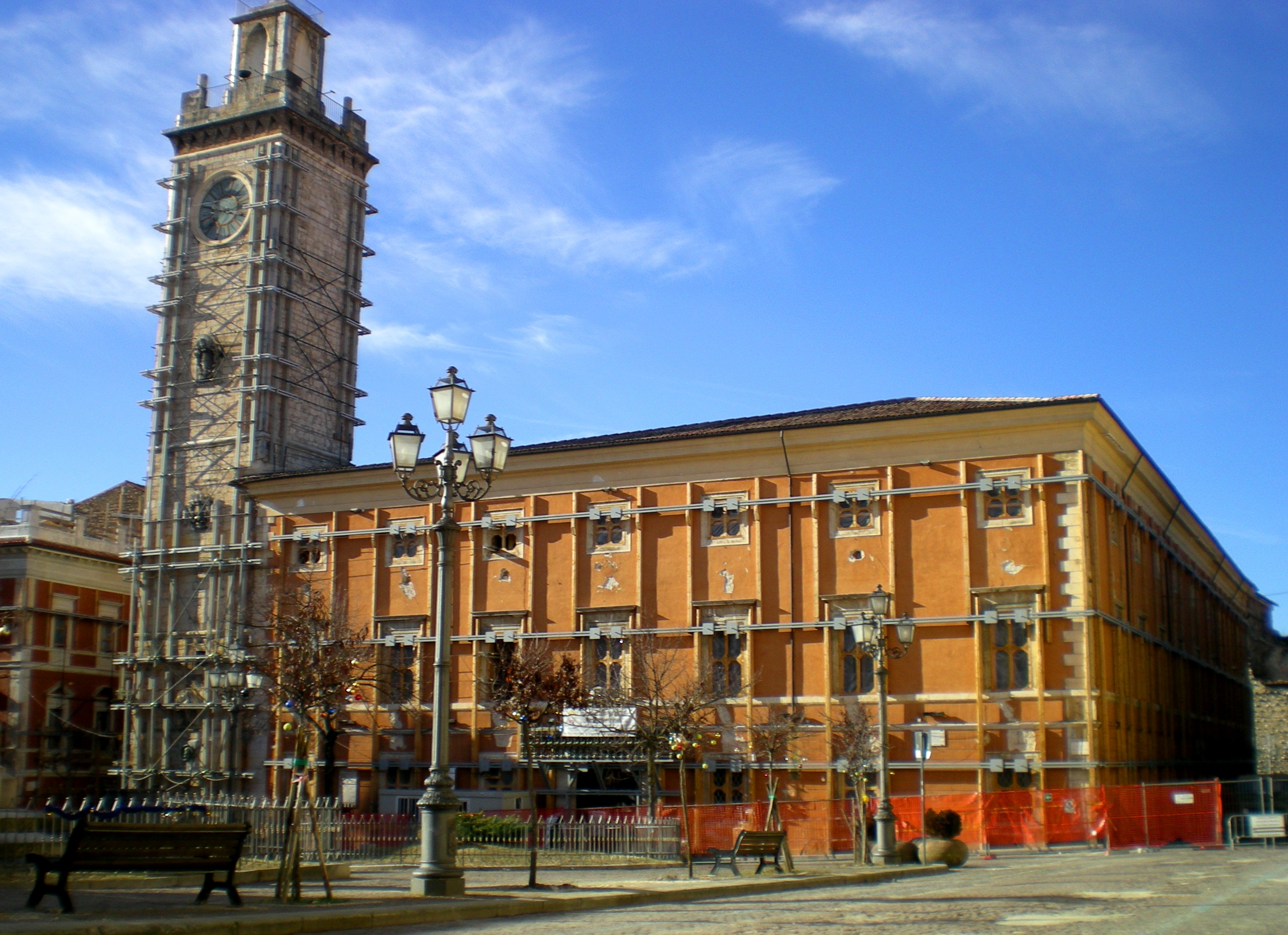 Palazzo Margherita d'Austria e torre civica (L'Aquila, Piazza Palazzo)